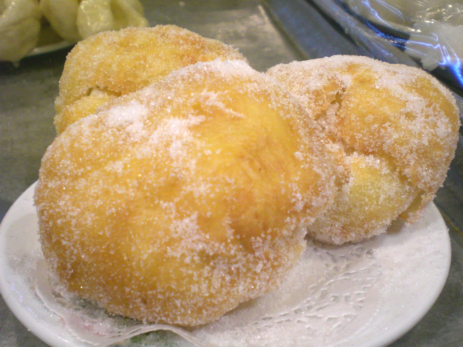 香港特色砂糖甜食 - 沙翁